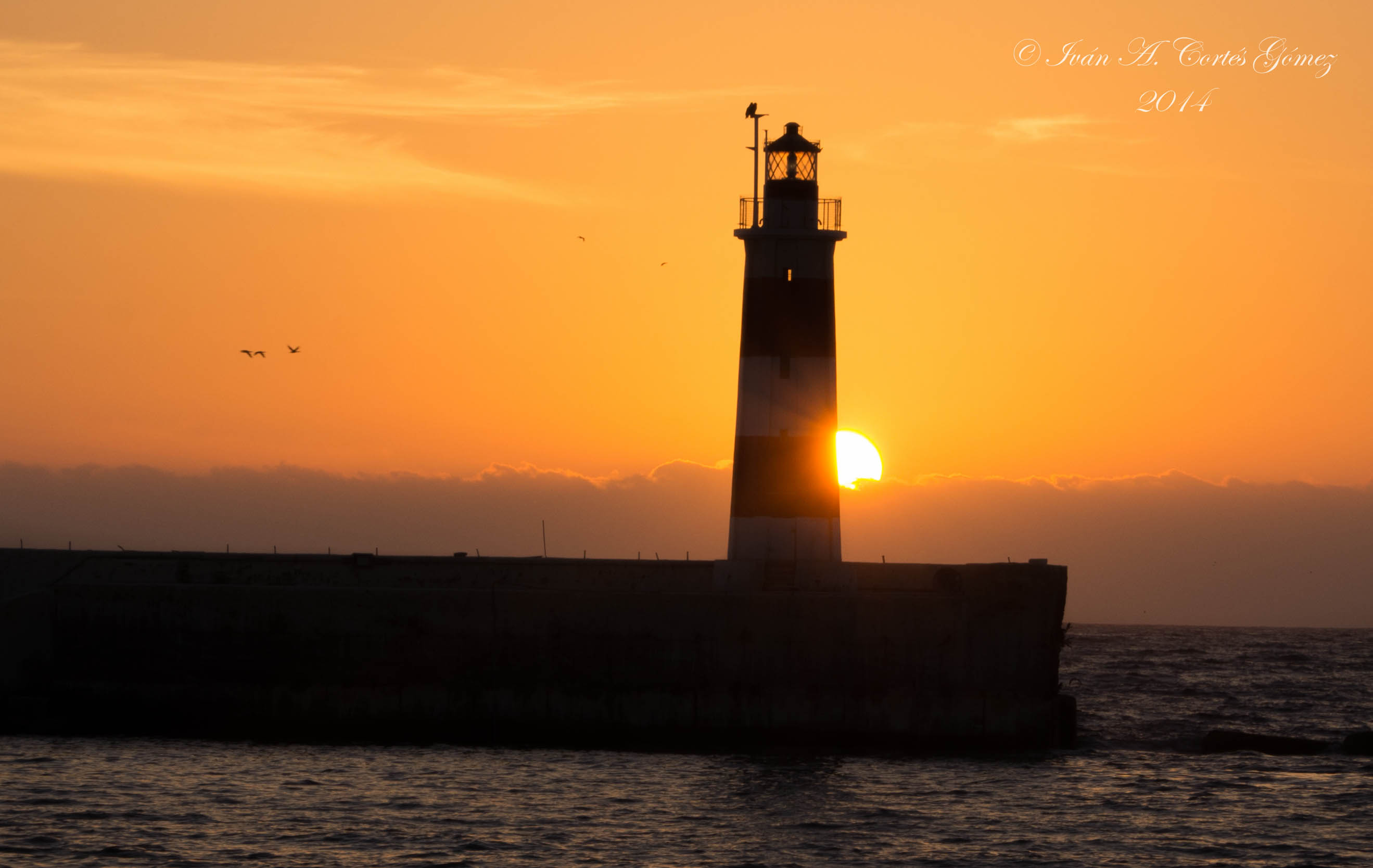 Faro puerto de Antofagasta.